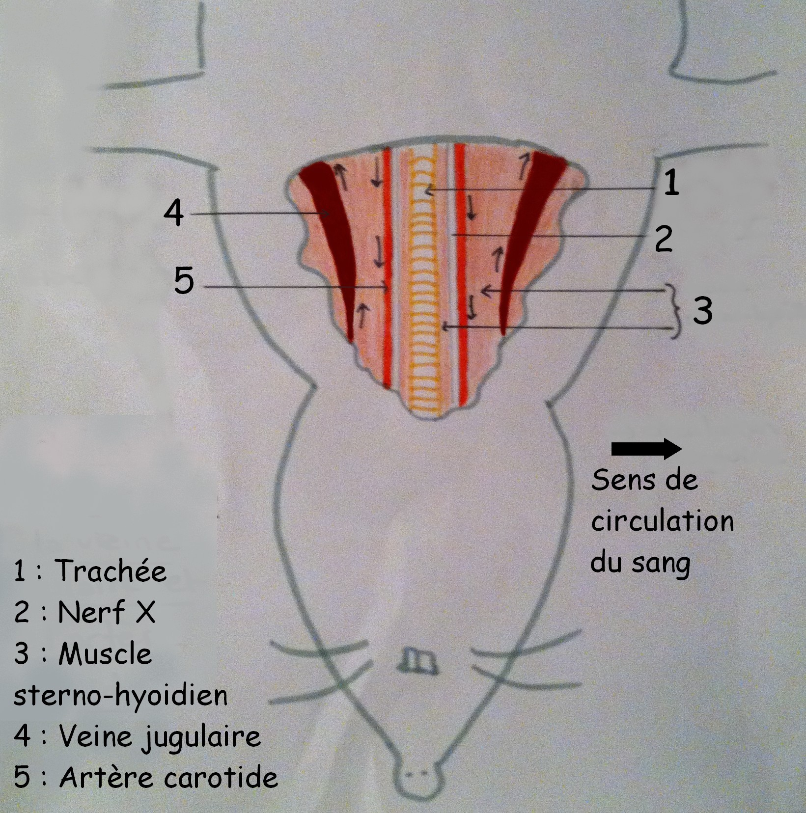 Schéma de la localisation des veines jugulaires et des artères carotides.